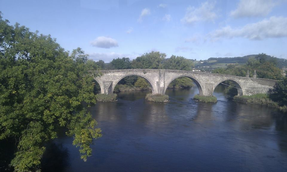 Stirling városának legrégebbi hídja